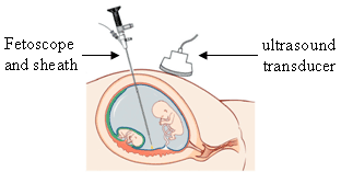 Fetoscope (fetal endoscope) illustration.